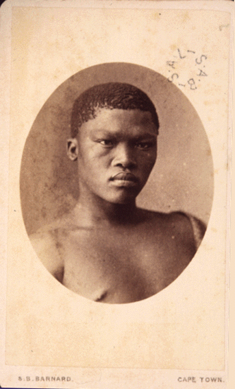 Buschmann in Kapstadt 1873